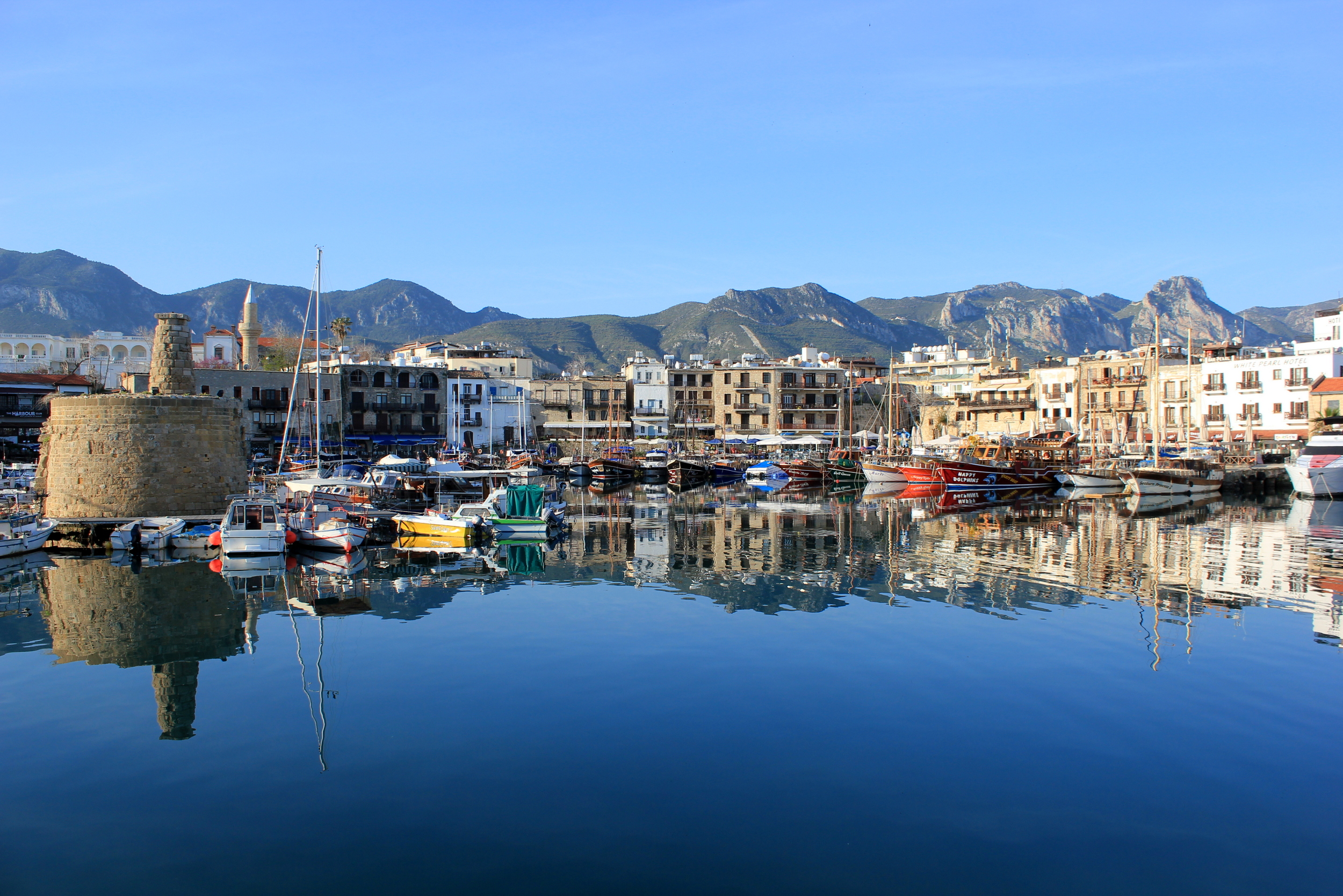 Alter Hafen in Kyrenia (Girne) in Nordzypern.